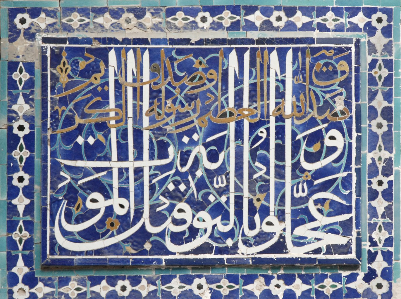 Panneau décoratif du portail du mausolée de Touman Aka (1404-1405) Touman Aka était la jeune épouse favorite de Tamerlan. Son mausolée est richement décoré de mosaïques aux décors géométriques. _________ Shah-i-Zinda est la nécropole du "Roi vivant", en raison de l'existence d'une légende liée à la mort de Qassim-ibn-Abbas, protecteur de Samarcande et Saint islamique. Shah-i-Zinda est accessible par un escalier datant du XVIIIème siècle qui a remplacé un chemin, l'ensemble est composé de mosquées et de mausolées construits sur la colline d'Afrosyab (le lieu de l'antique Samarcande). Le mausolée du cousin du Prophête : Qassim-ibn-Abbas, a été construit le premier à cet endroit au XIème siècle, puis réaménagé au XIVème siècle, car c'était devenu le principal lieu saint de la ville. Ce missionnaire musulman, mort à Samarcande, était arrivé en Sogdiane en 676 au moment de la conquête arabe. De nombreuses tombes ont été construites à proximité de celle du Saint dans les siècles qui ont suivi, donnant naissance à cet ensemble majeur du patrimoine islamique de Samarcande.